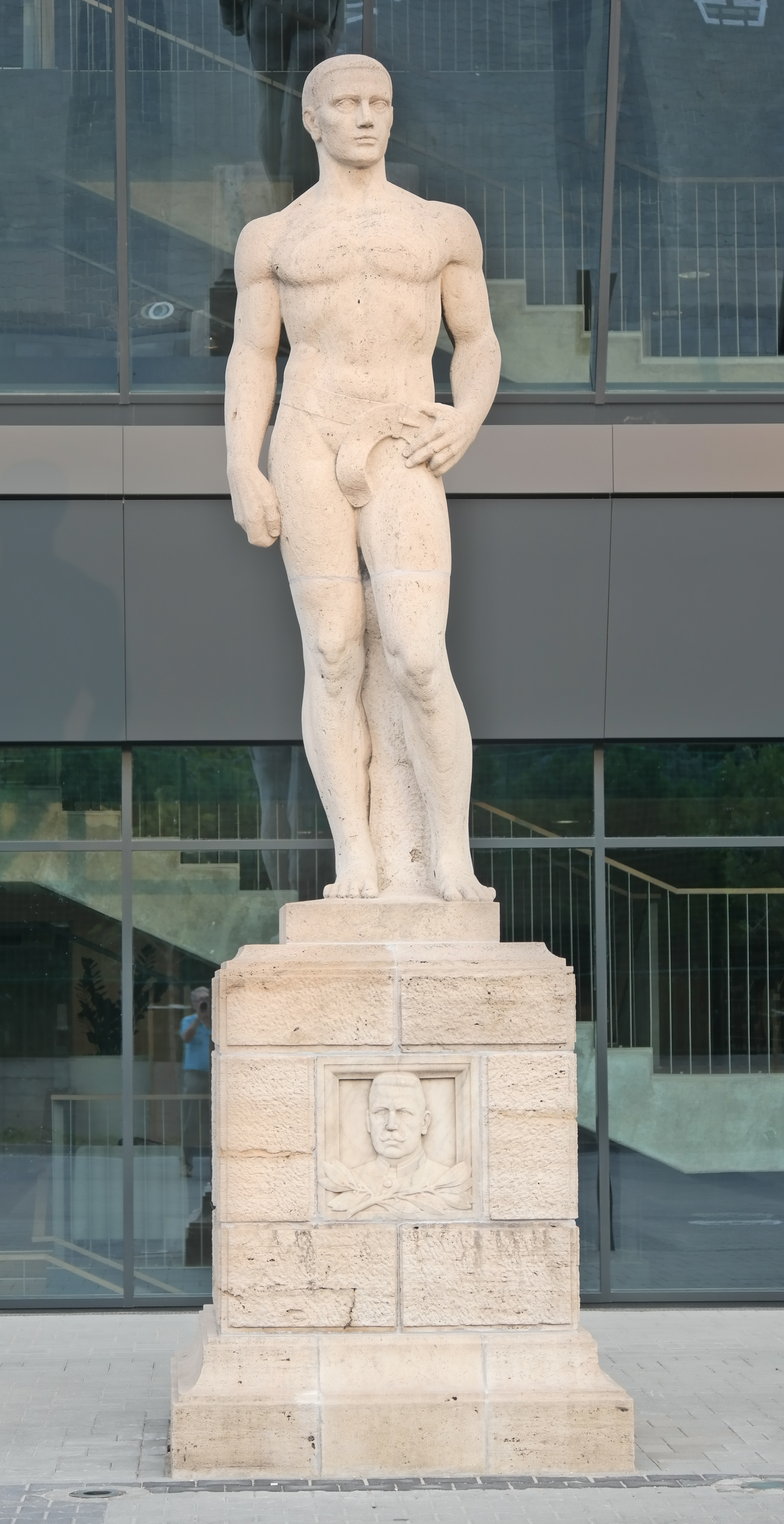 Springer-szobor az FTC stadionjánál. Alkotó: Mátrai Lajos (Groupama Aréna)